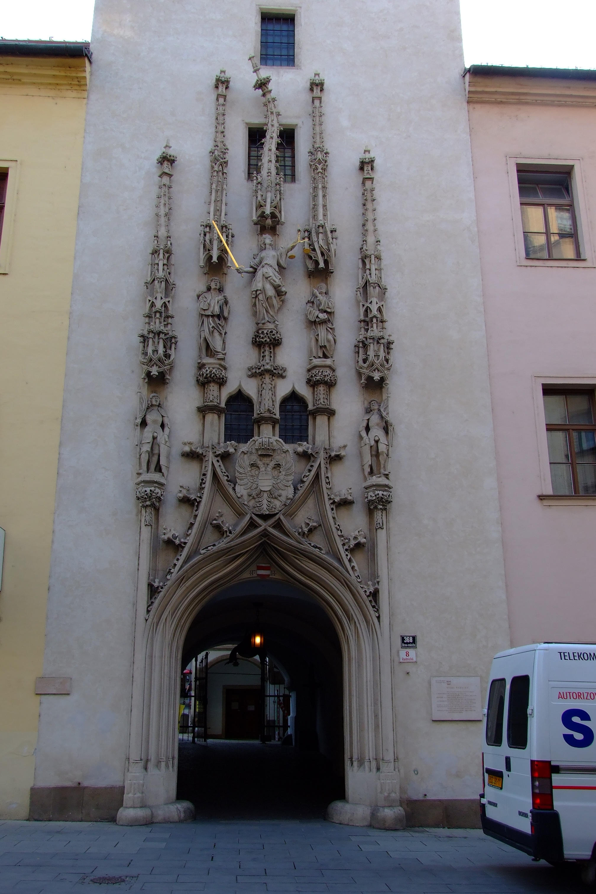 Portál Staré radnice v Brně